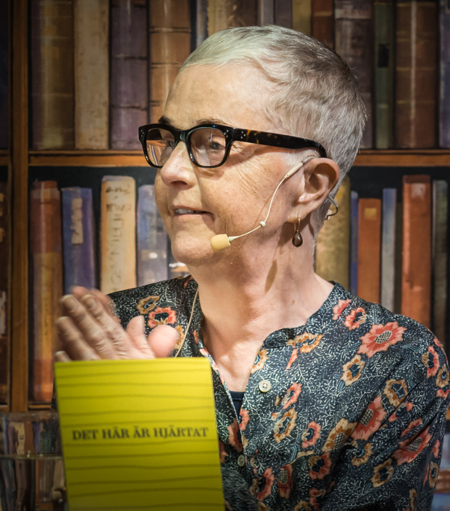 Bodil Malmsten på Akademibokhandeln, Mäster Samuelsgatan, i Stockholm och samtalar om sin senaste bok "Det här är hjärtat", den 19 september 2015.